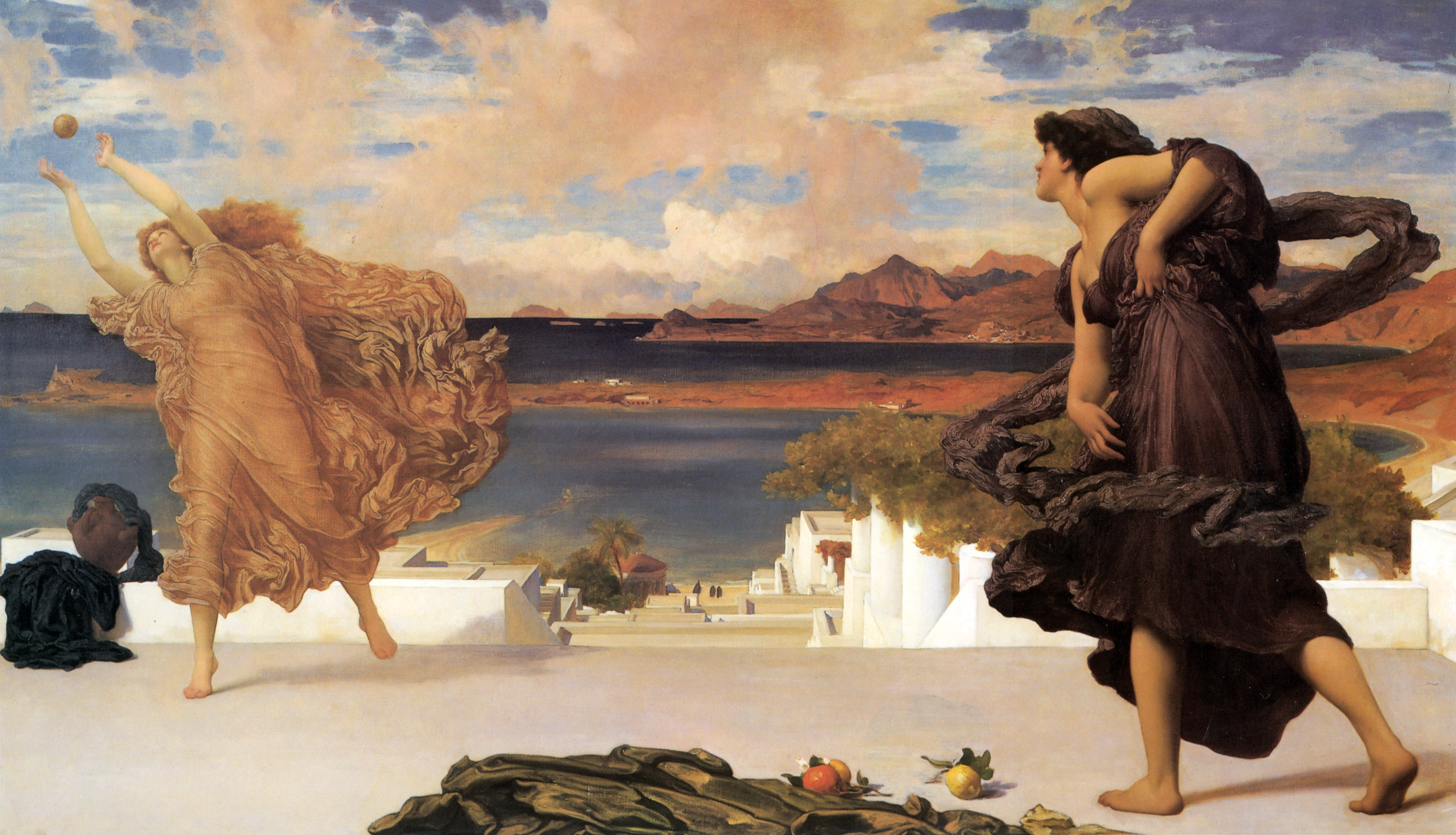 Frederic Leighton, 1st Baron Leighton (1830–1896) DescriptionBritish painter, sculptor and politicianDate of birth/death 3 December 1830 25 January 1896 Location of birth/death Scarborough LondonWork periodcirca 1855-1896Work location London Authority control : Q160252 VIAF: 18031604 ISNI: 0000 0000 8339 6135 ULAN: 500030022 LCCN: n80079496 NLA: 35556809 WorldCat creator QS:P170,Q160252 Noies gregues jugant a pilota22. Obra prerafaelita de Frederic Leighton.